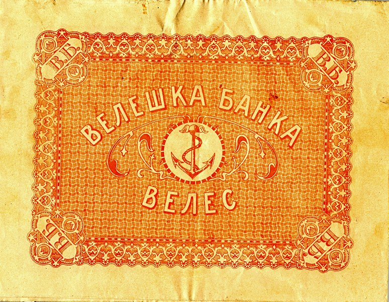 Акция на Велешката банка.